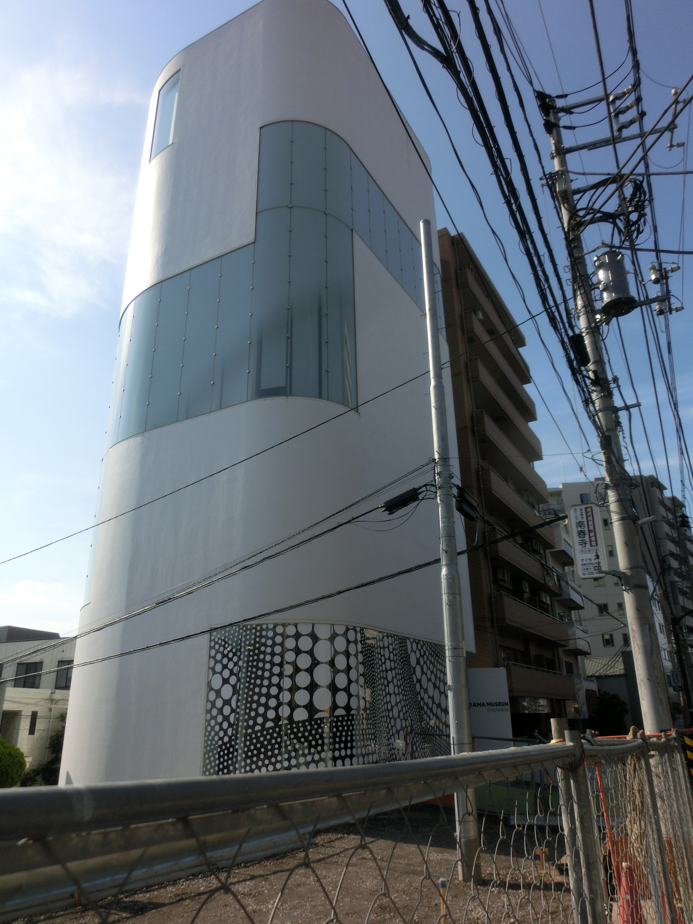 YAYOI KUSAMA MUSEUM 草間彌生美術館（2018年）